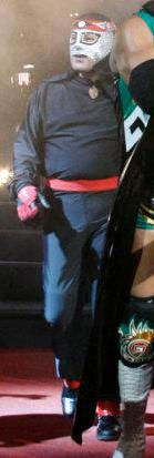 Dr Wagner Jr. Primer Campeon Latinoamericano de la triple A